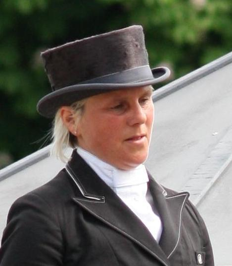 77. Internationales Pfingstturnier Wiesbaden 2013, CDI **** Dressurprüfung Grand Prix de Dressage, Gräf, Uta mit Dandelion Personality rights warning Although this work is freely licensed or in the public domain, the person(s) shown may have rights that legally restrict certain re-uses unless those depicted consent to such uses. In these cases, a model release or other evidence of consent could protect you from infringement claims.